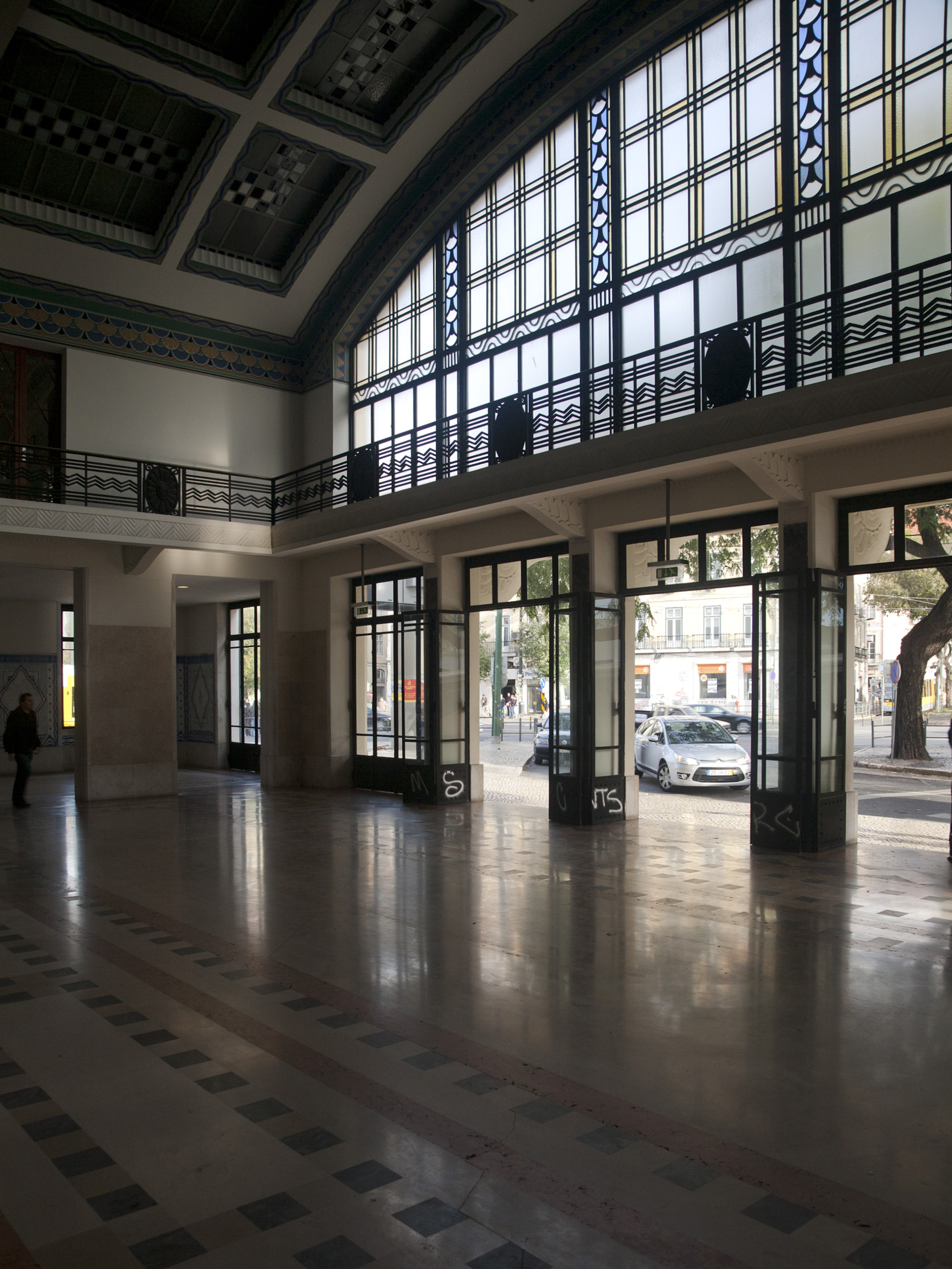 Estação do Cais do Sodré, Lisboa; Arq. Porfírio Pardal Monteiro